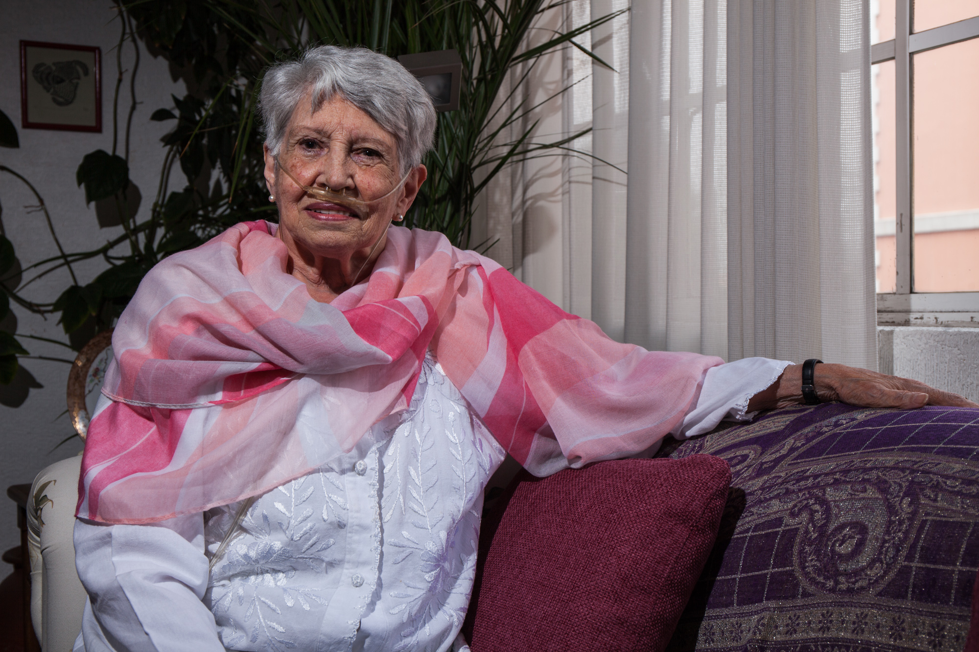 Teresita de Barbieri, socióloga feminista, pionera en las investigaciones sobre la condición de las mujeres en América Latina (AL), académica de alto rendimiento, militante socialista, sobreviviente del golpe militar chileno, y defensora de la democracia.